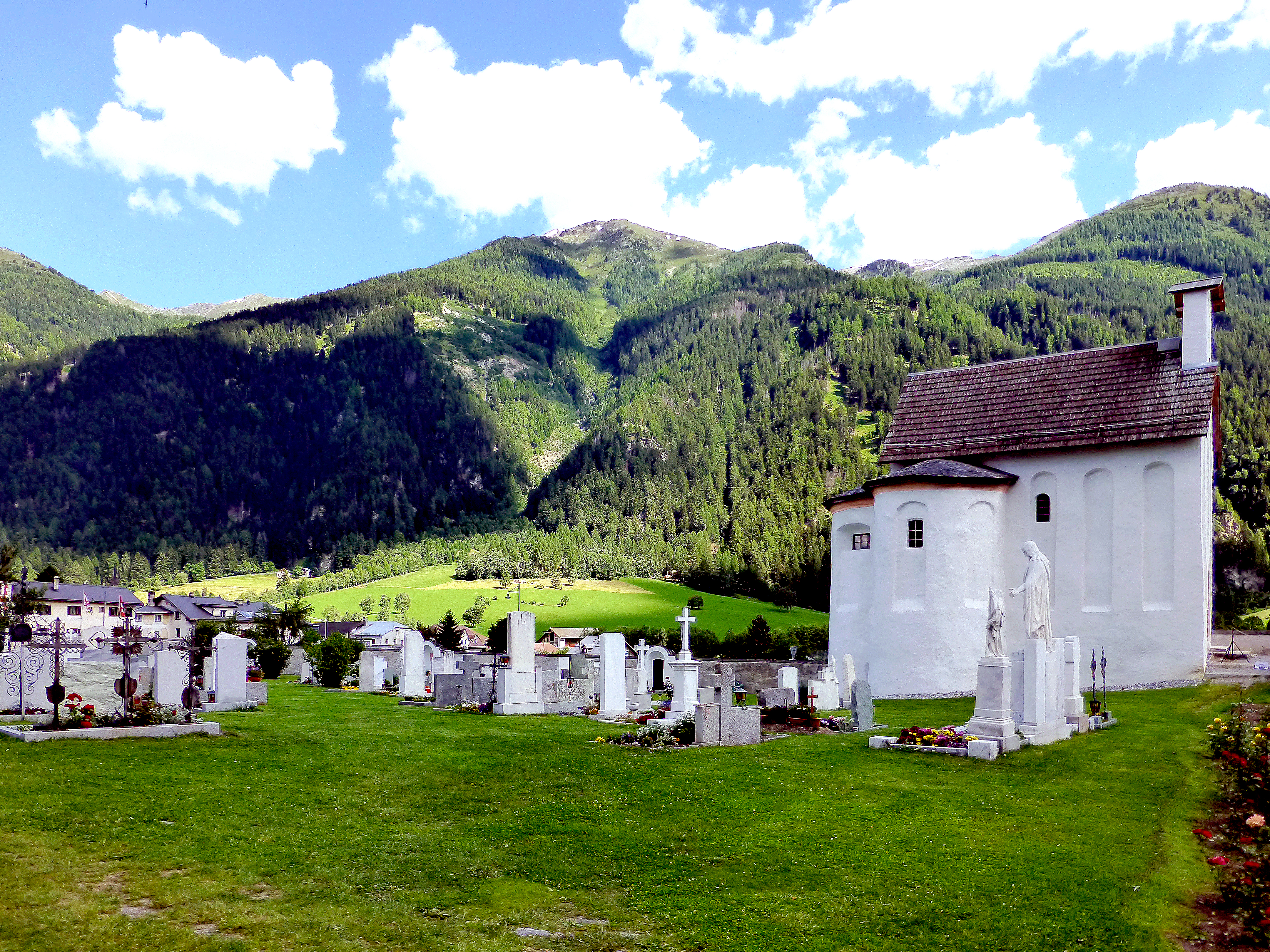 Kápolna és temető Müstairban (Svájc)